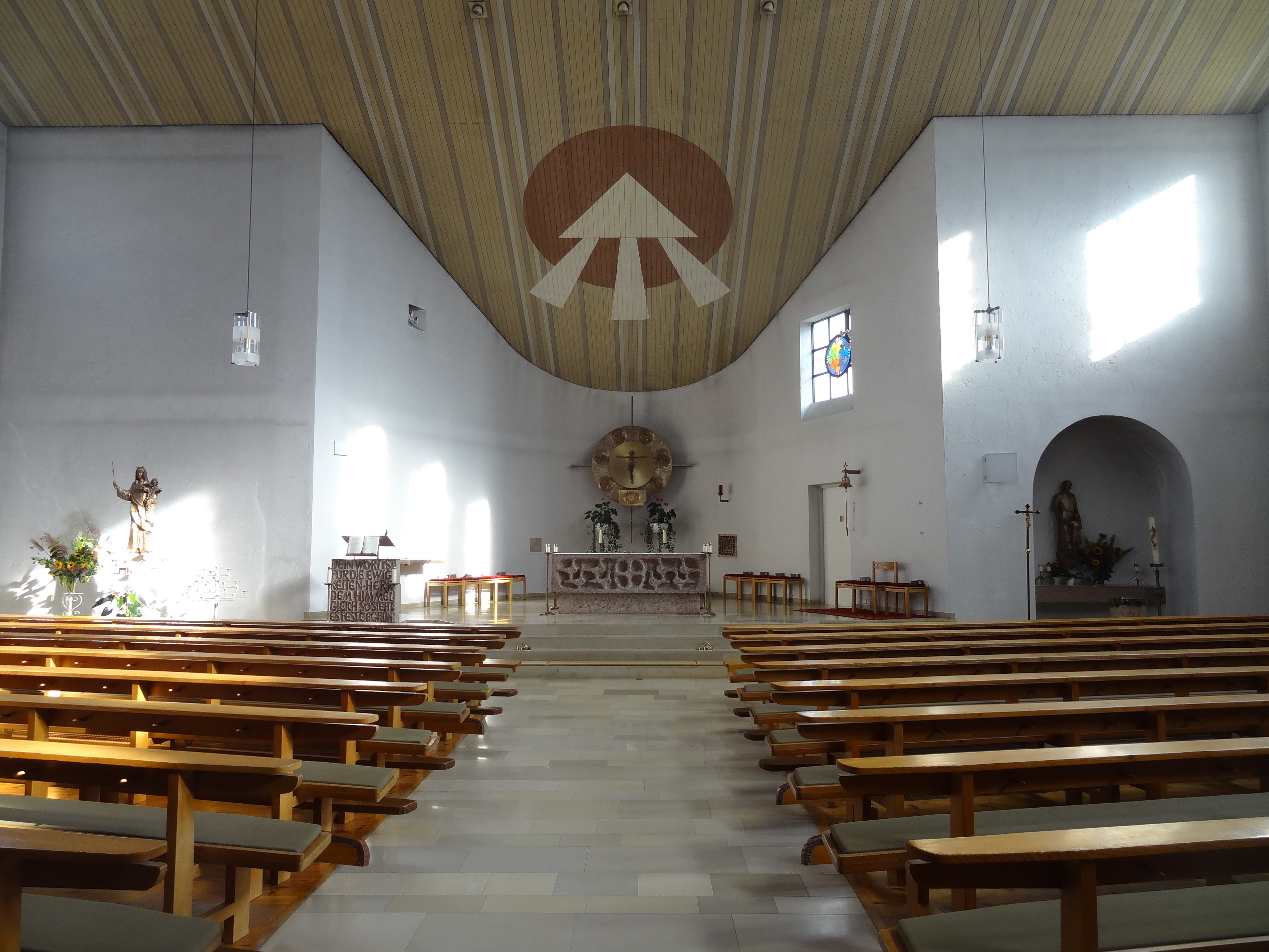 Innenraum der Pfarrkirche St. Josef in Niederaichbach (Lkr. Landshut, Bayern)